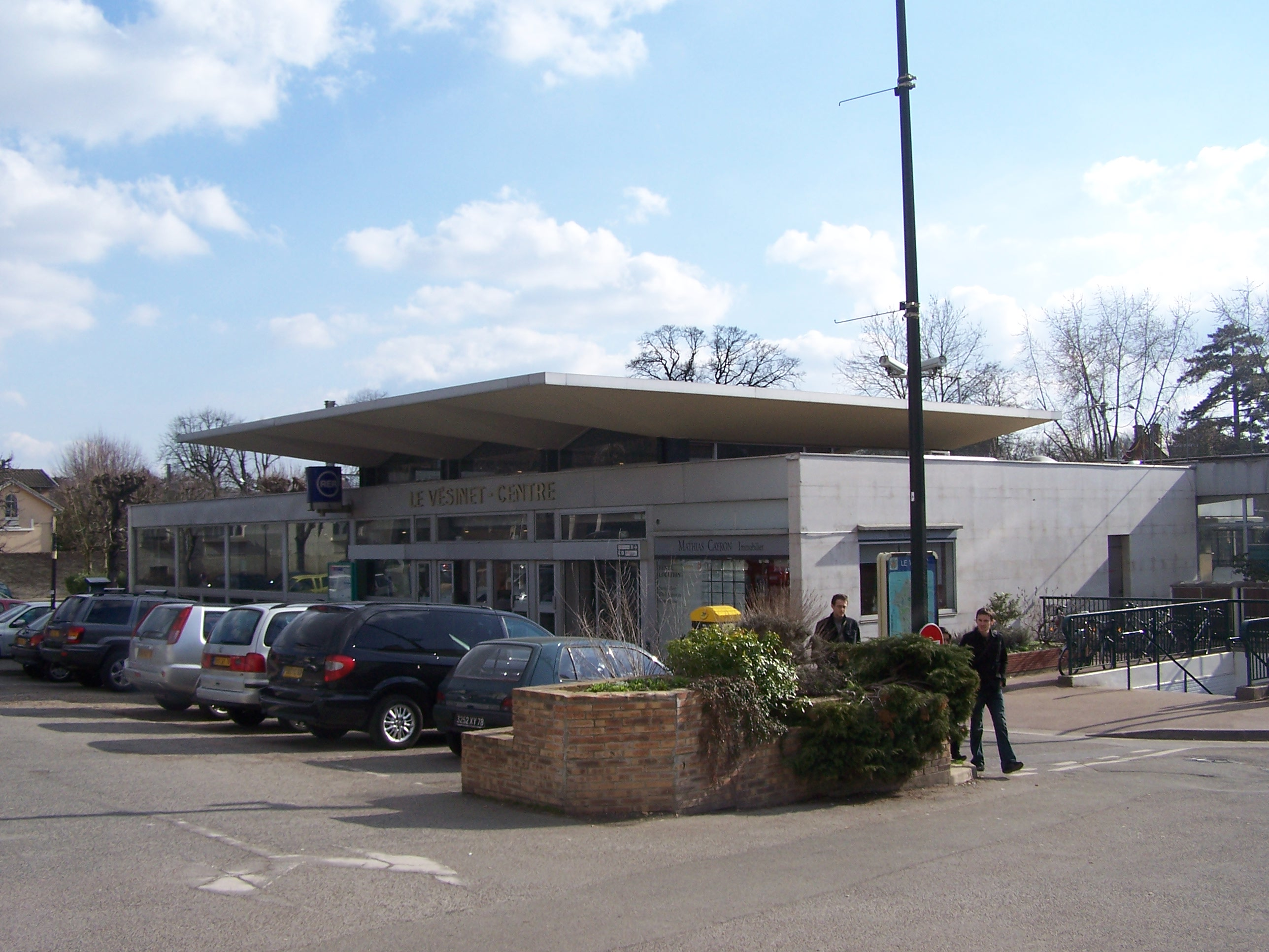 Gare du Vésinet - Centre au Vésinet, Yvelines, France